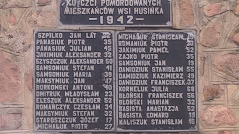 ТАБЛИЧКА С ФАМИЛИЯМИ УНИЧТОЖЕННЫХ ЖИТЕЛЕЙ ДЕРЕВНИ ГУСИНКА